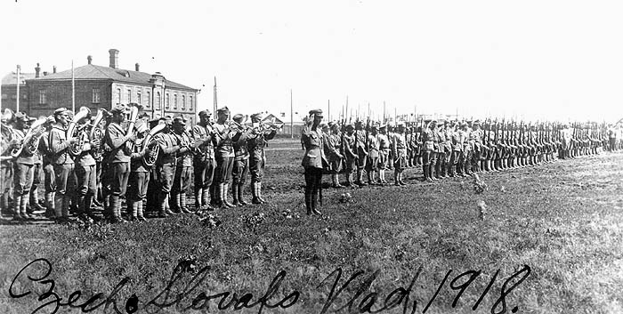 AEF Siberia